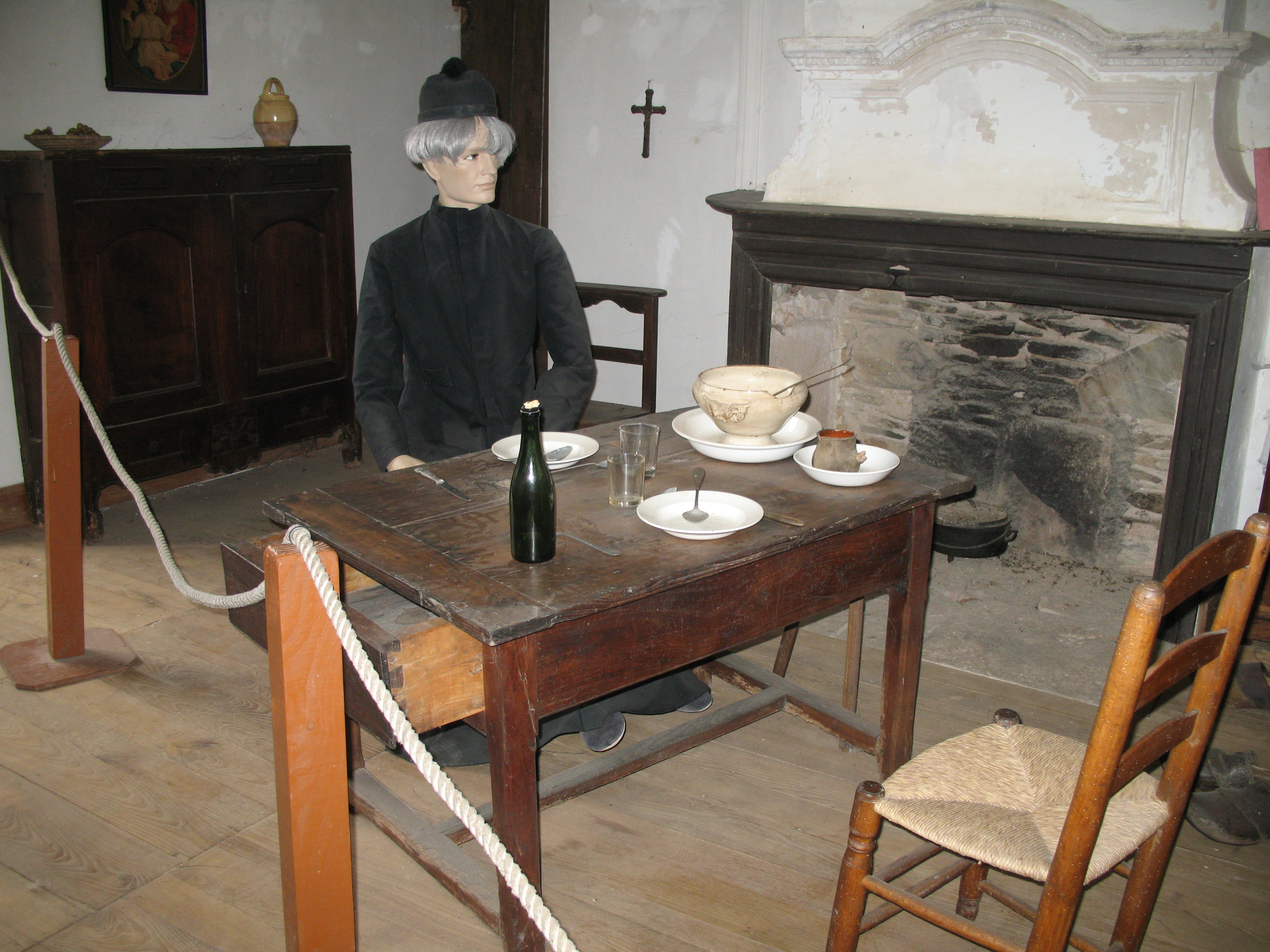 Scène d'intérieur dans le château de Brousse, à Brousse-le-Château dans l'Aveyron.